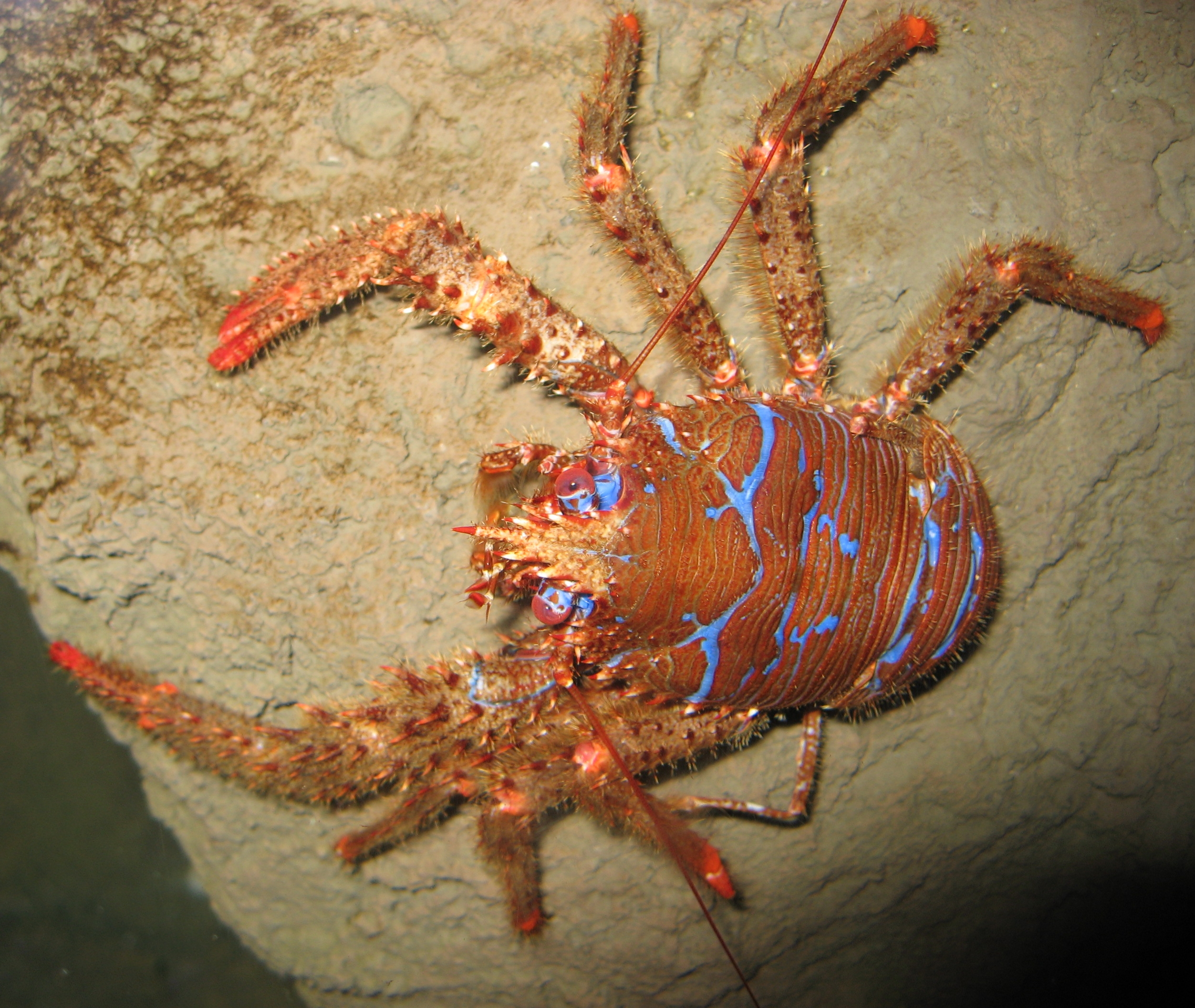 Galathea strigosa in Aquarium Cinéaqua Map: 48° 51' 44" N 2° 17' 27" E